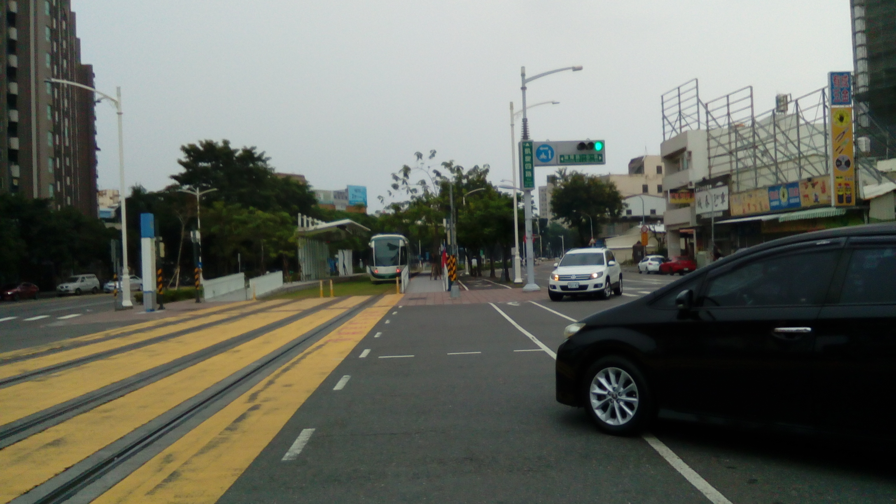 位於瑞隆路、一心路及凱旋路口